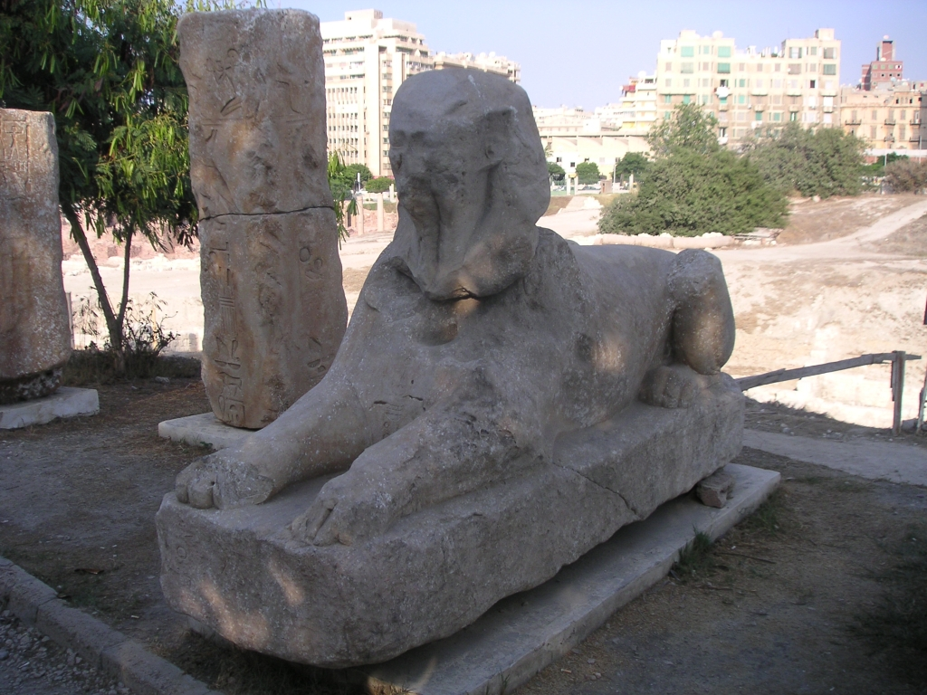 Sphinx colossal de Psammétique II provenant d'Héliopolis et retrouvé à Alexandrie - XXVIe dynastie égyptienne